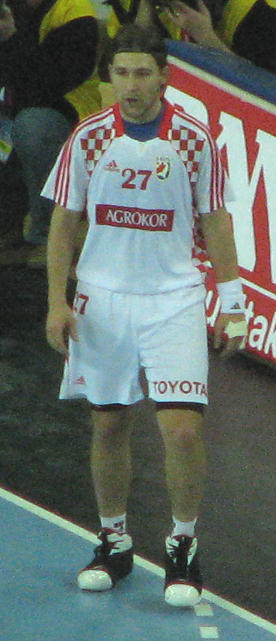 Ivan Ćupić